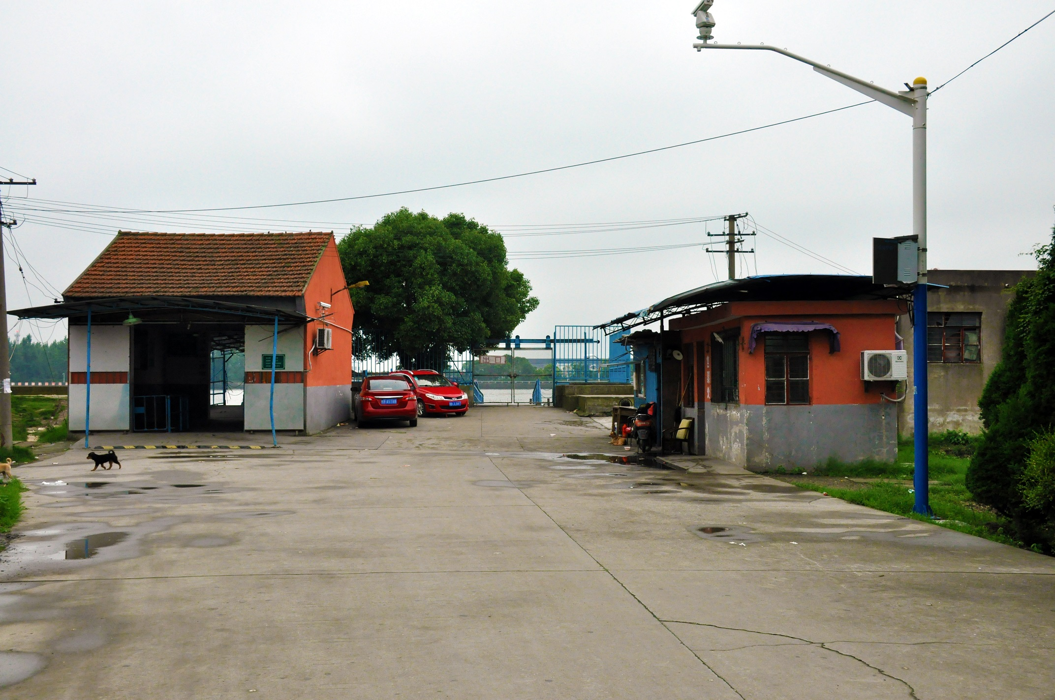 邬马渡马桥渡口